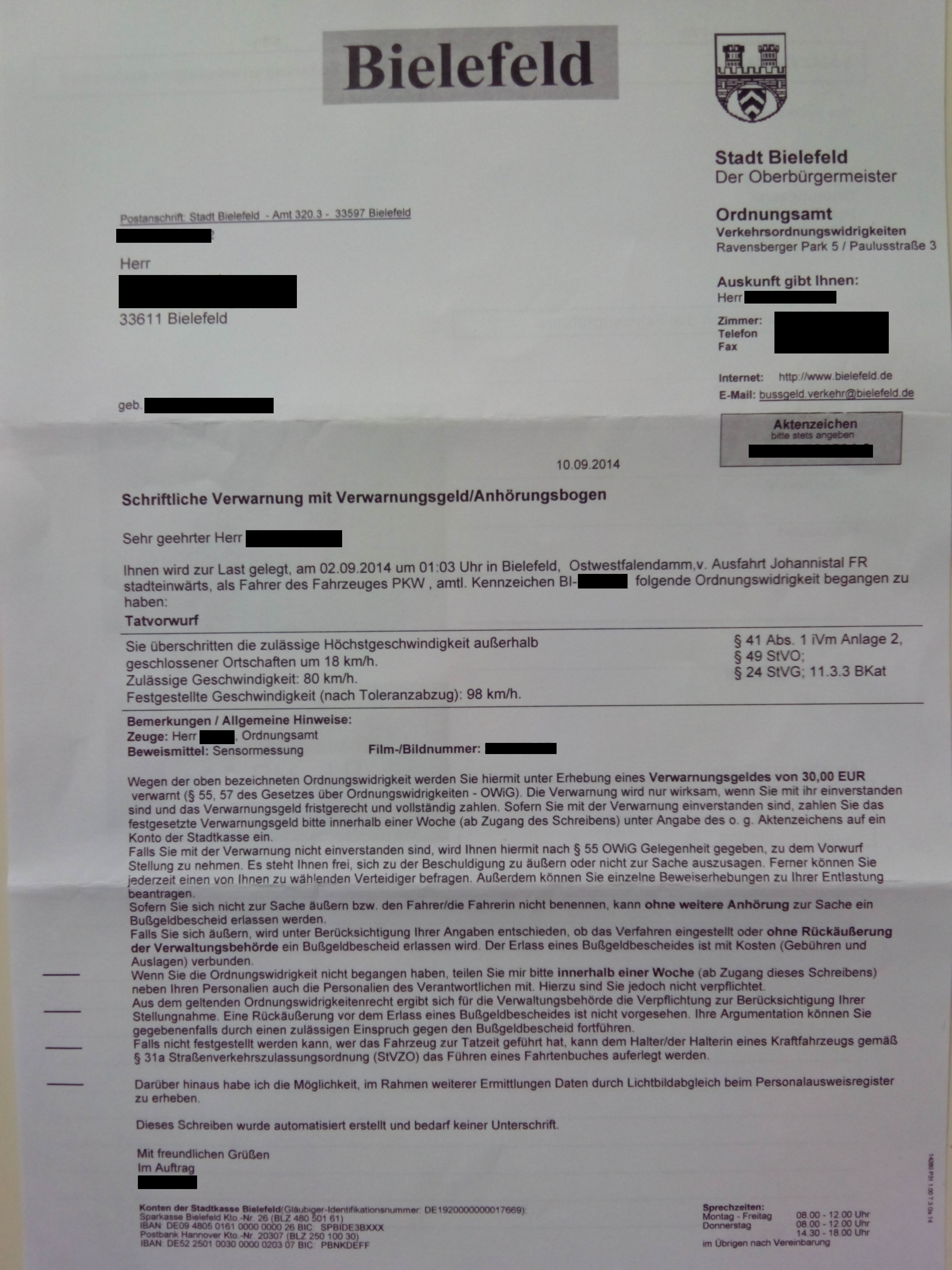 Verwarnungsgeldbescheid der Stadt Bielefeld wegen Überschreitens der zulässigen Höchstgeschwindigkeit im Jahr 2014